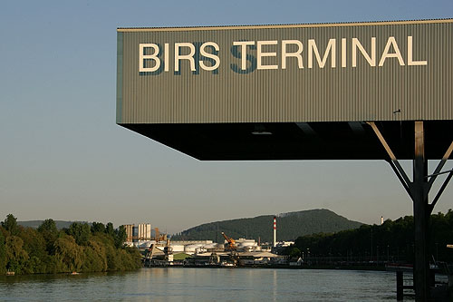 Blick vom Hafenareal Birsfelden zum Auhafen